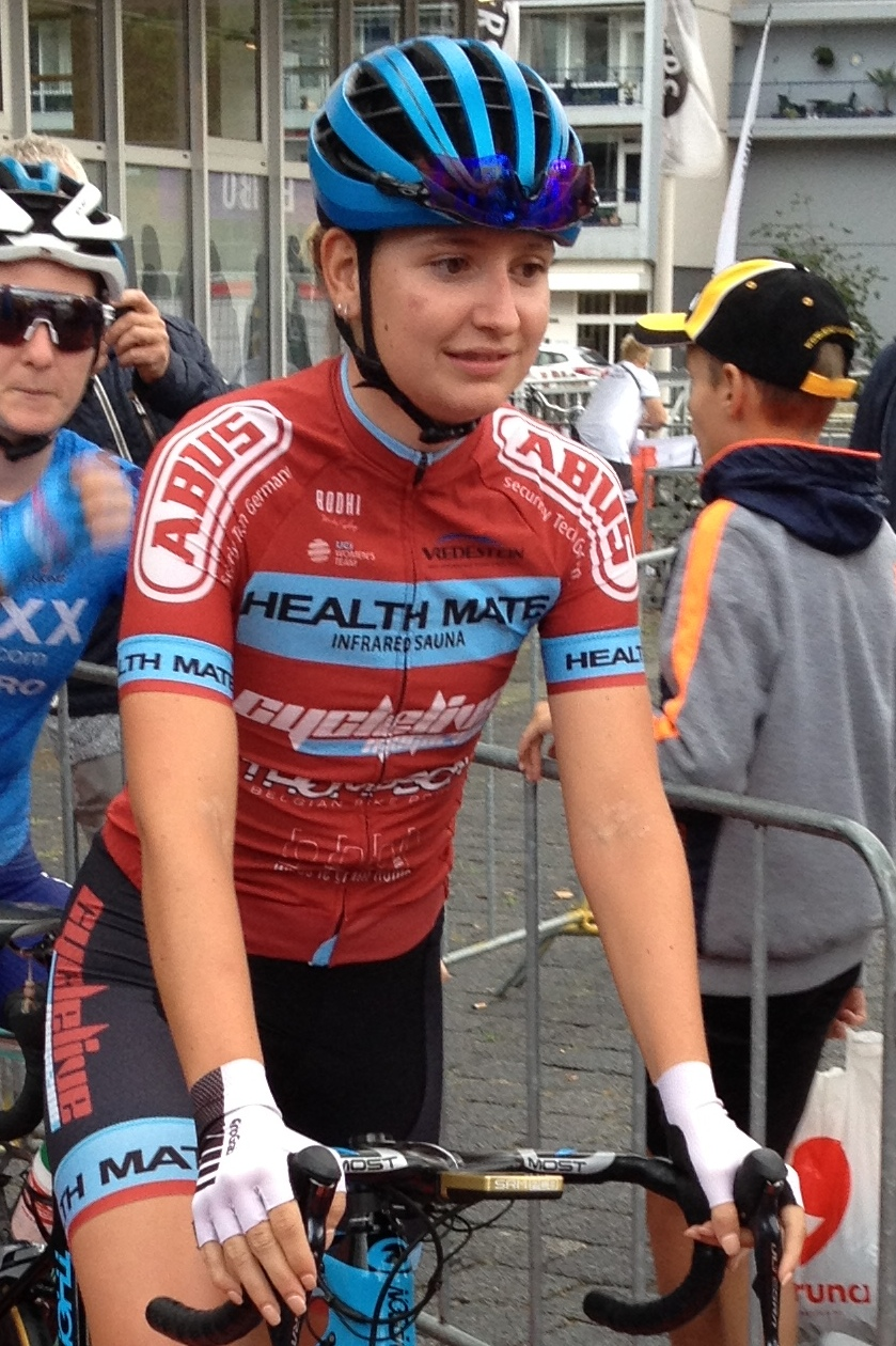 Criterium RaboRonde in Heerlen op vrijdag 2 augustus 2019